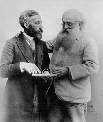 William Quan Judge (links) und Henry Steel Olcott im Jahre 1891, Theosophische Gesellschaft